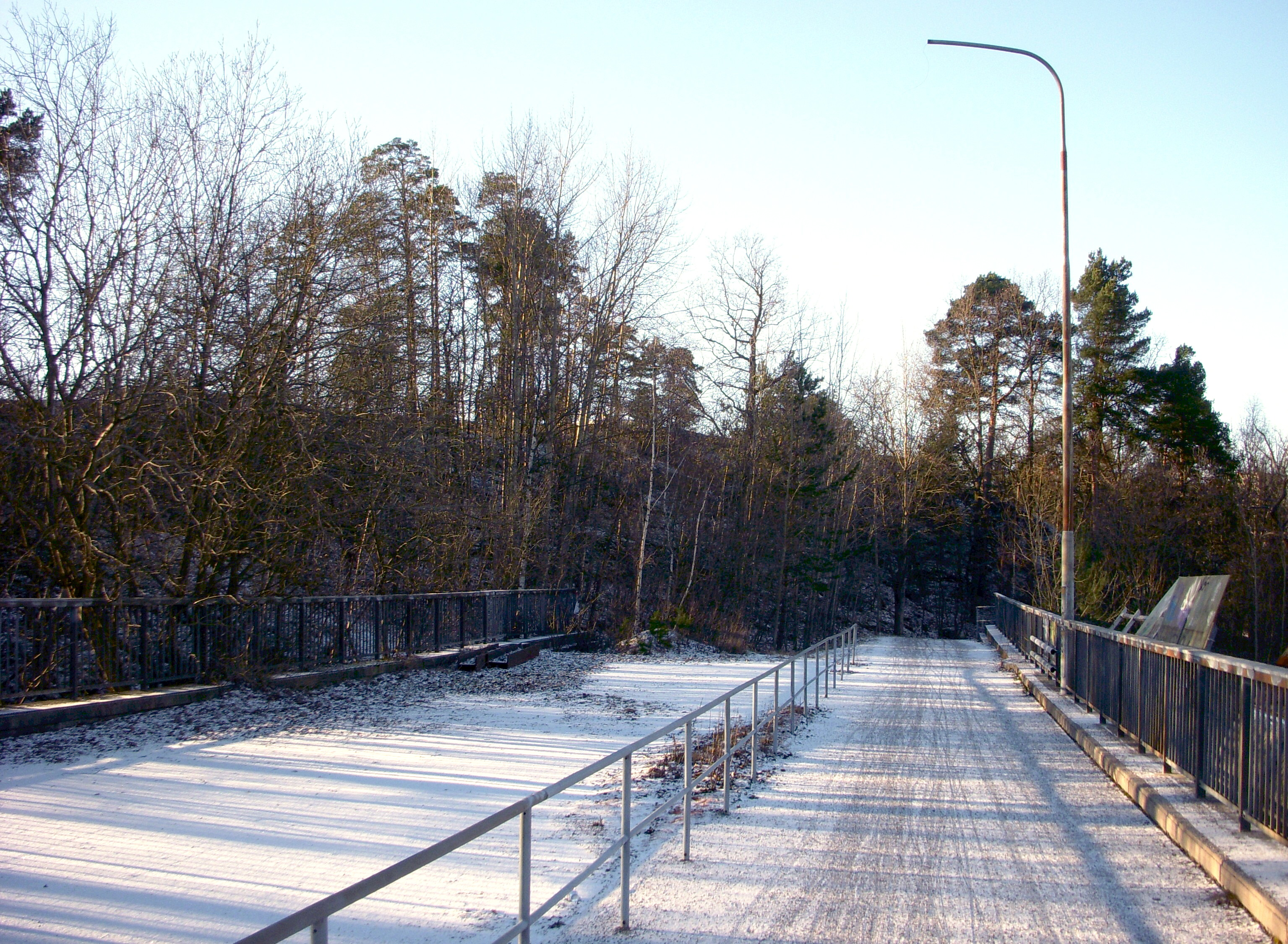 Huvudstaleden (aldrig genomförd motorvägsprojekt) i Solna och Stockholm